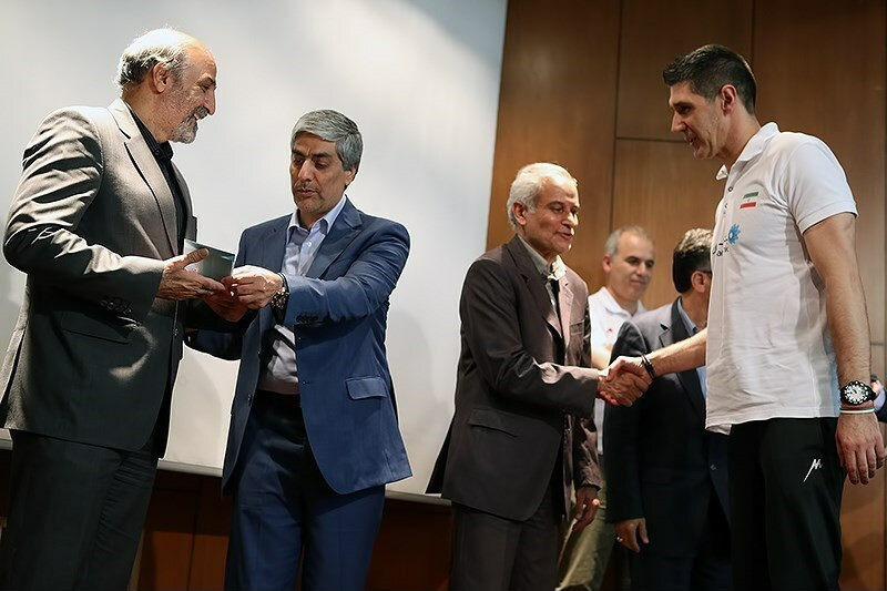 Iran’s National Volleyball Team Praised for Brilliant Performance July, 14, 2014 - 16:20 TEHRAN (Tasnim) - A ceremony was held on Sunday evening in Tehran to thank Iran’s national volleyball players for their brilliant performance in 2014 FIVB World League. Iran Coach: Serbia Slobodan Kovać assistant: Hossein Madani Gh.[12] Number Name Date of Birth Height (cm) 2014 Club Position 1 Shahram Mahmoudi 20.07.1988 198 Iran Matin Varna O 2 Saeed Mostafavand 04.02.1983 195 Iran Matin Varna MB 3 Saman Faezi 23.08.1991 204 Iran Paykan Teheran VC MB 4 Saeid Marouf (C) 20.10.1985 189 Iran Matin Varna S 5 Farhad Ghaemi 28.08.1989 197 Iran Barij Esans Kaszan OH 6 Mohammad Mousavi 22.08.1987 203 Iran Matin Varna MB 7 Pourya Fayazi 12.01.1993 194 Iran Shahrdari Urmia OH 8 Farhad Zarif 03.03.1983 165 Iran Kalleh Mazandaran VC L 9 Adel Gholami 09.02.1986 195 Iran Kalleh Mazandaran VC MB 10 Amir Ghafour 06.06.1991 202 Iran Barij Esans Kaszan O 11 Rahman Davoudi 18.02.1988 195 Iran Mizan Khorasan VC OH 12 Mojtaba Mirzajanpour 07.10.1991 195 Iran Matin Varna OH 13 Mehdi Mahdavi 13.02.1984 191 Iran Barij Esans Kaszan S 14 Arash Keshavarzi 16.02.1987 198 Iran Paykan Teheran VC 15 Abdolreza Alizadeh 19.02.1987 183 Iran Shahrdari Urmia L 16 Armin Tashakkori 08.12.1986 200 Iran Barij Esans Kaszan MB 17 Reza Ghara 31.07.1991 200 Iran Kalleh Mazandaran VC U 18 Mohammad Taher Vadi 10.10.1989 194 Iran Matin Varna S 19 Mehdi Mahdavi 12.05.1986 172 Iran Shahrdari Tabriz VC L 20 Alireza Mobasheri 10.06.1988 190 Iran Mizan Khorasan VC OH 21 Alireza Jadidi 11.02.1989 202 Iran Kalleh Mazandaran VC MB 22 Milad Ebadipour 17.10.1993 202 Iran Kalleh Mazandaran VC O